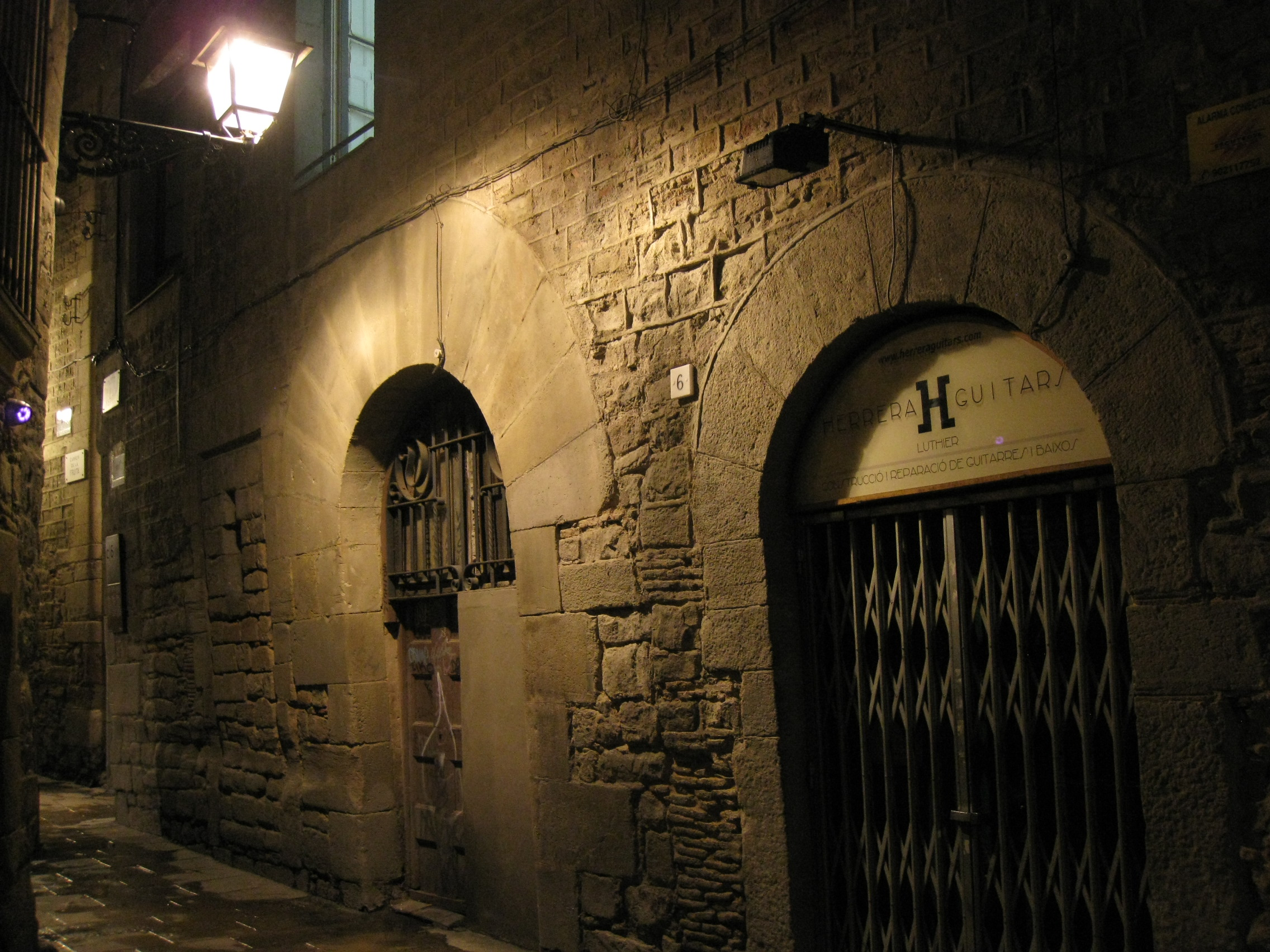 Edifici originari del segle XIII, situat al carrer de Sant Domènec del Call núm. 3-5, a la cantonada amb el carrer de Marlet, al barri Gòtic de Barcelona. Fou objecte d'una remodelació modernista per part d'Antoni Gallissà el 1899 i va ser restaurat a la dècada del 1960. Vista dels baixos del carrer de Marlet, amb dos portals adovellats i una porta cegada.